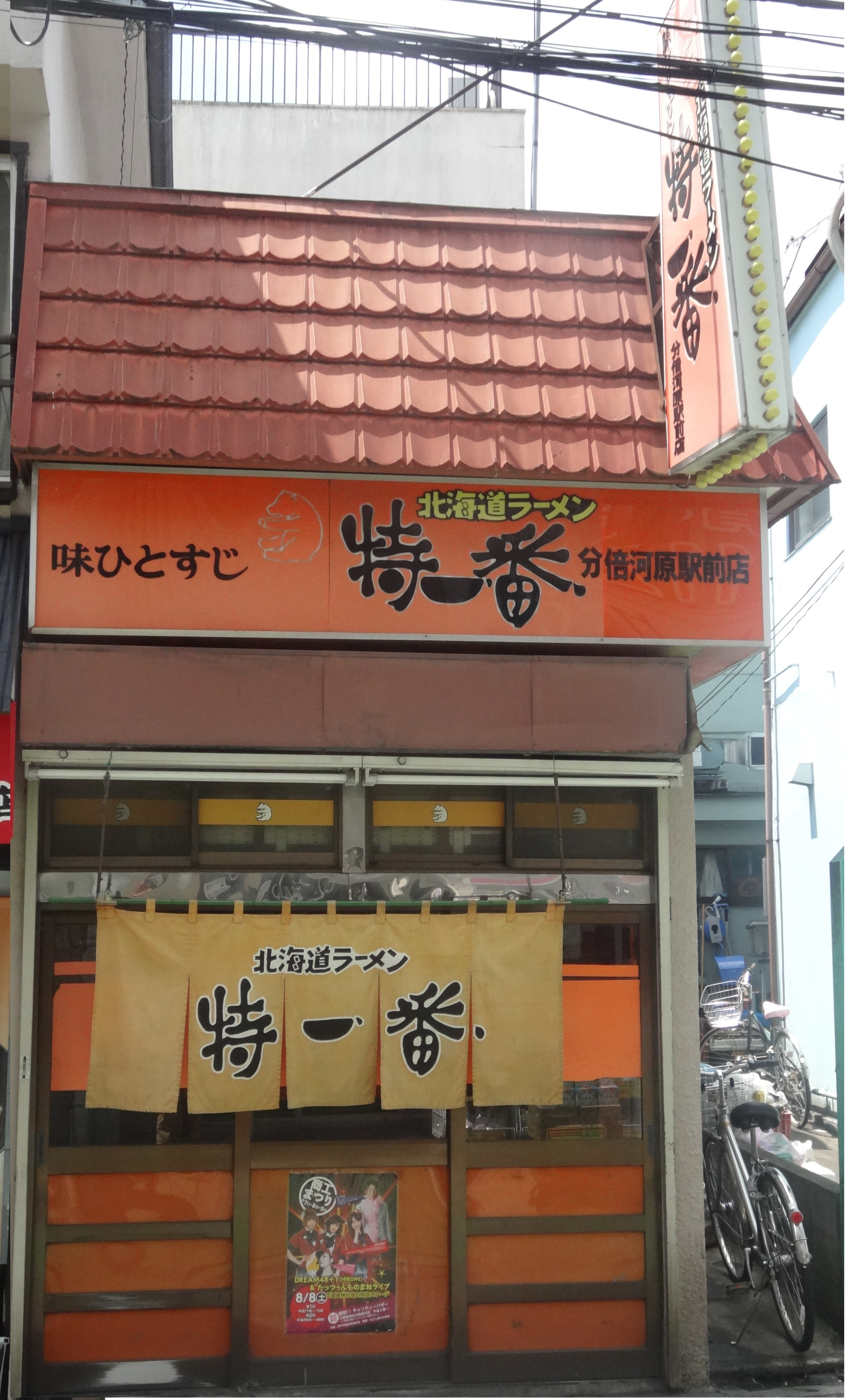 特一番 分倍河原店外観